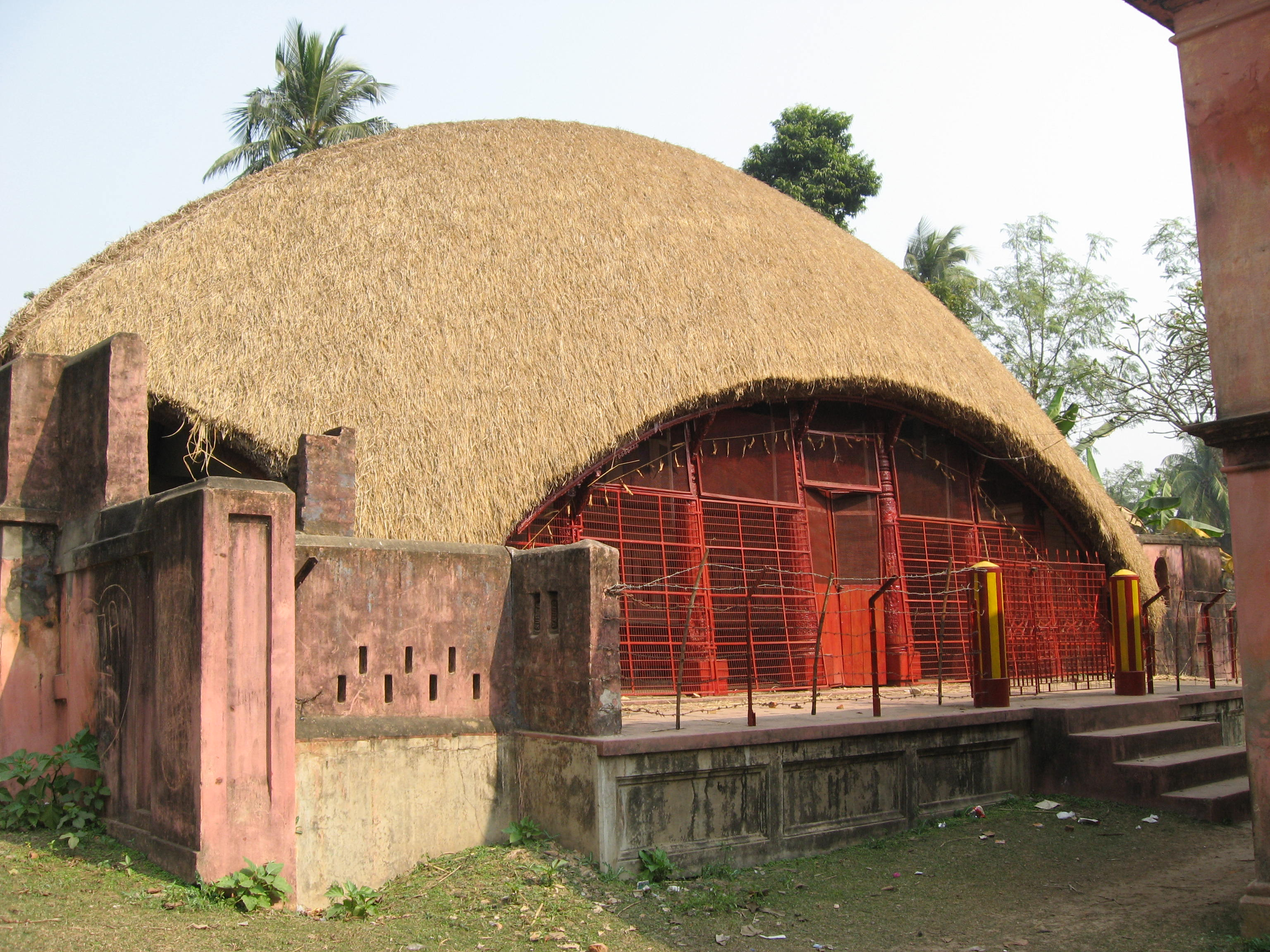 Antpur Chandimandap